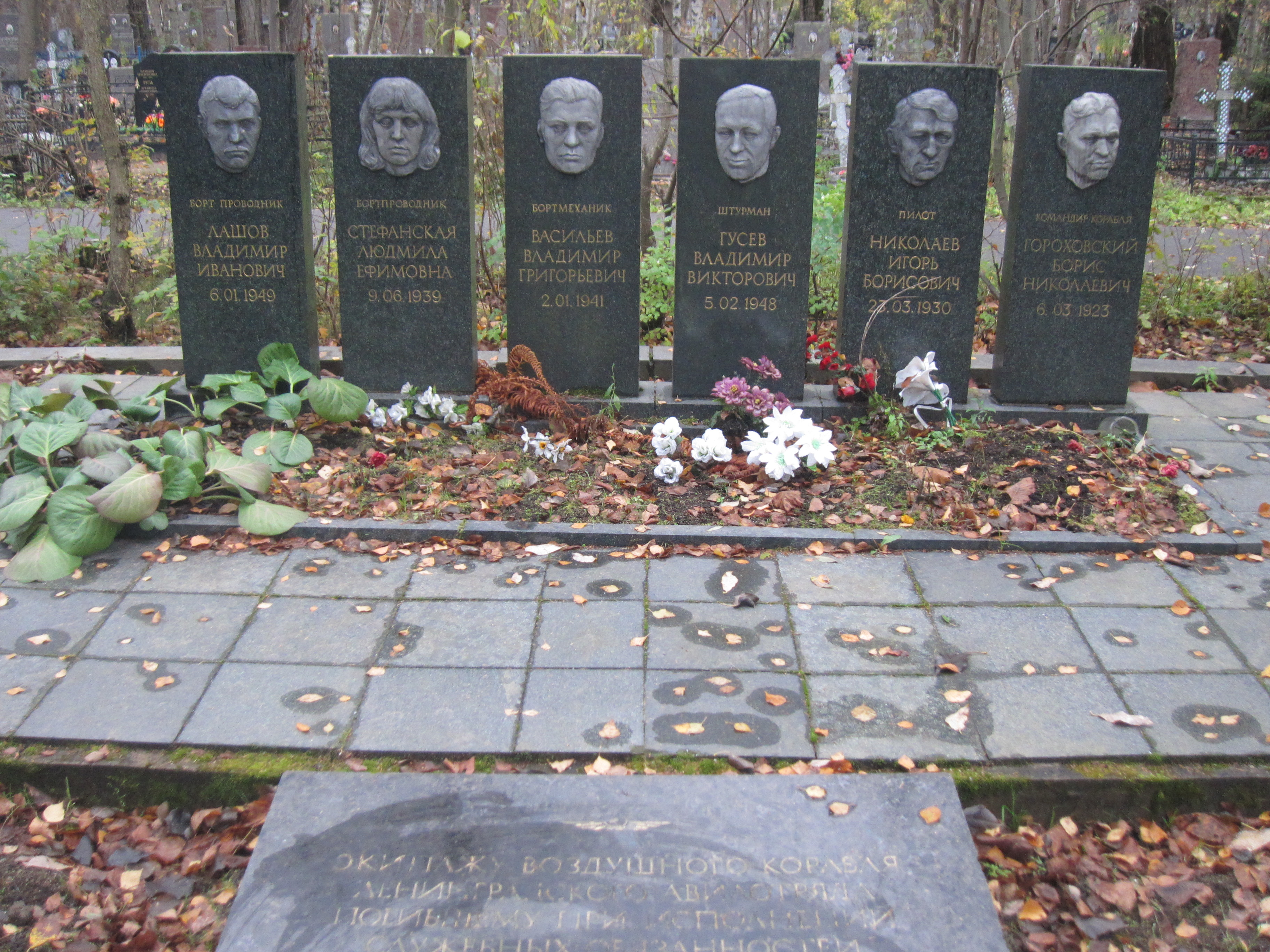 Мемориал, посвящённый экипажу самолёта Ту-104Б, разбившегося 28 ноября 1976 года близ аэропорта Шереметьево